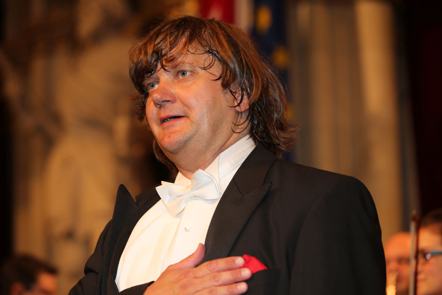 Felix Korobov-1005